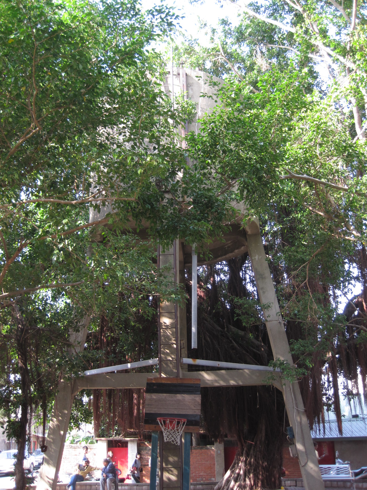 二空新村水塔。